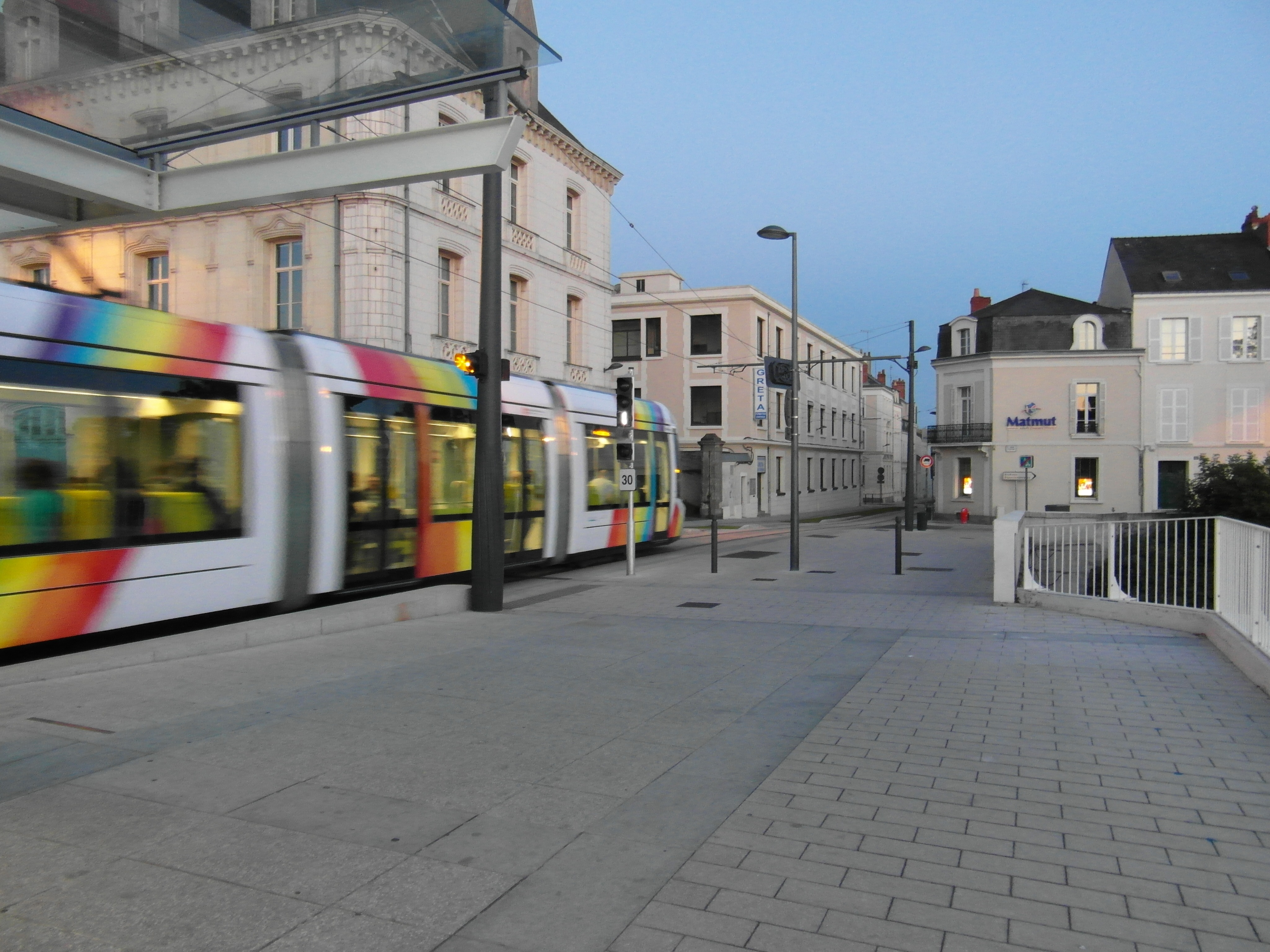 Straßenbahn Angers - Städtebauliche Integration im Bereich Gares (Bahnhöfe), Boulevard du Maréchal Foch und Rue d'Alsace